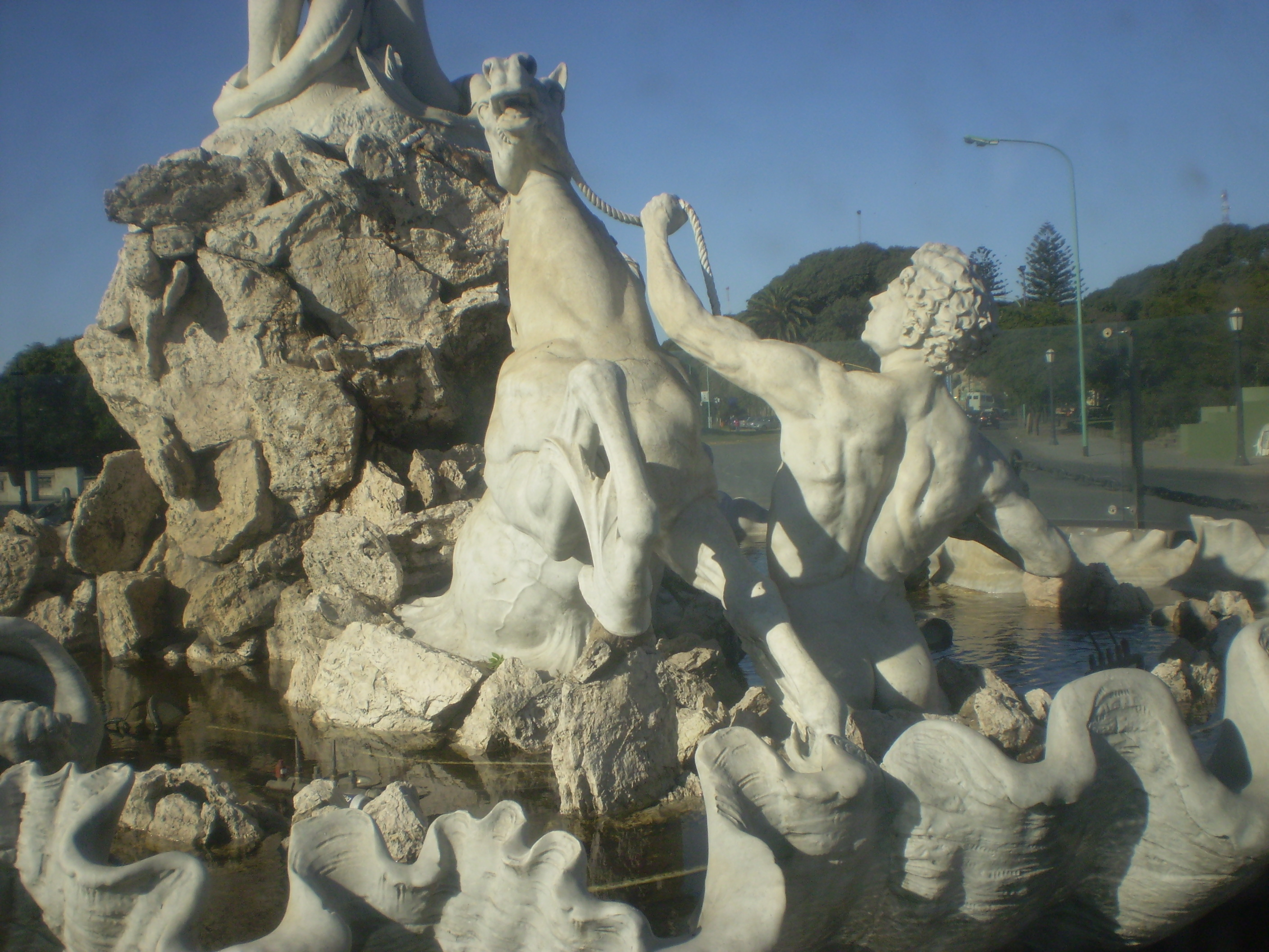 Fuente de las Nereidas (Lola Mora ), Buenos Aires